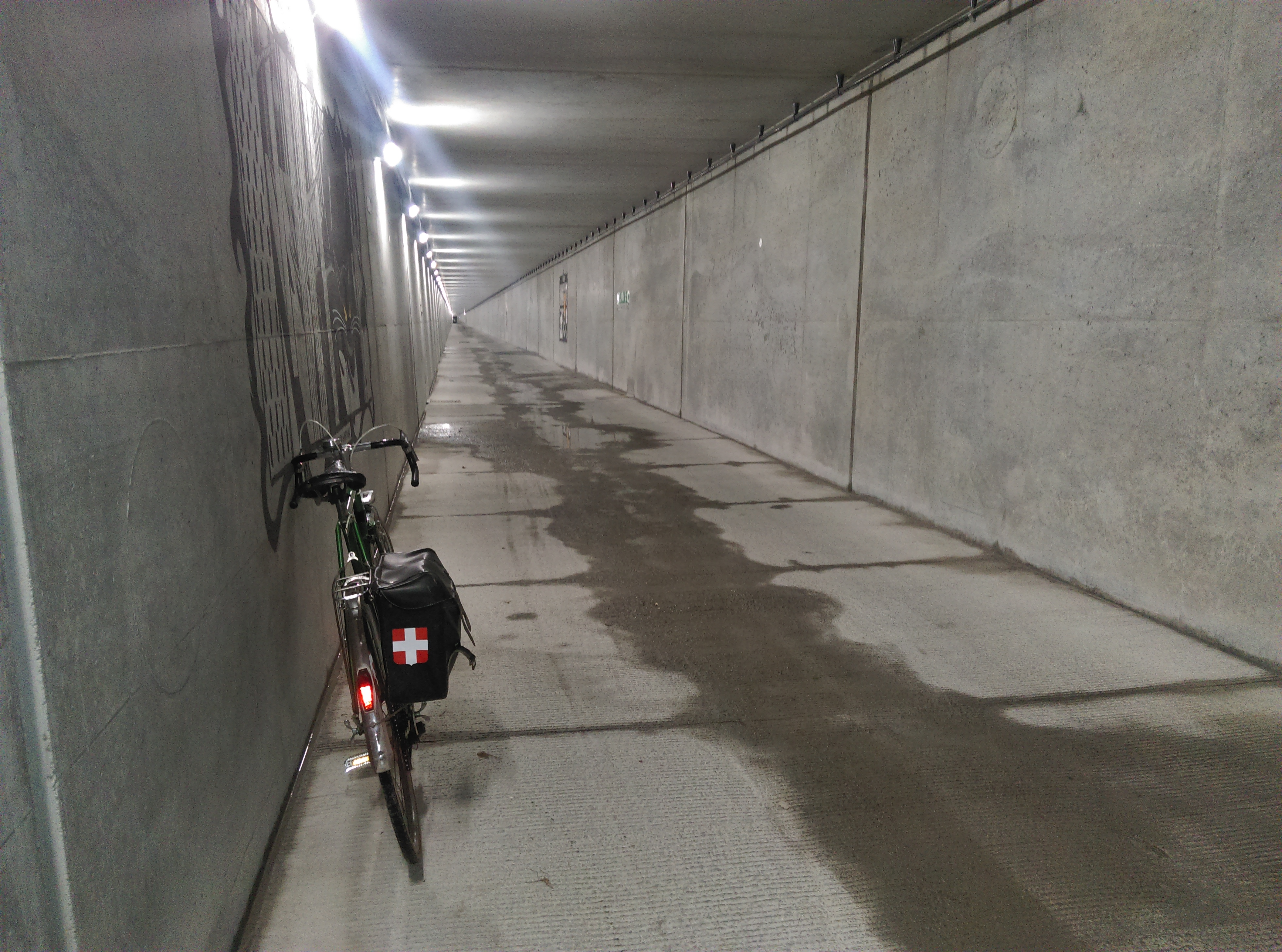 Vue intérieure de la galerie modes doux du Tunnel du Chat (Savoie).